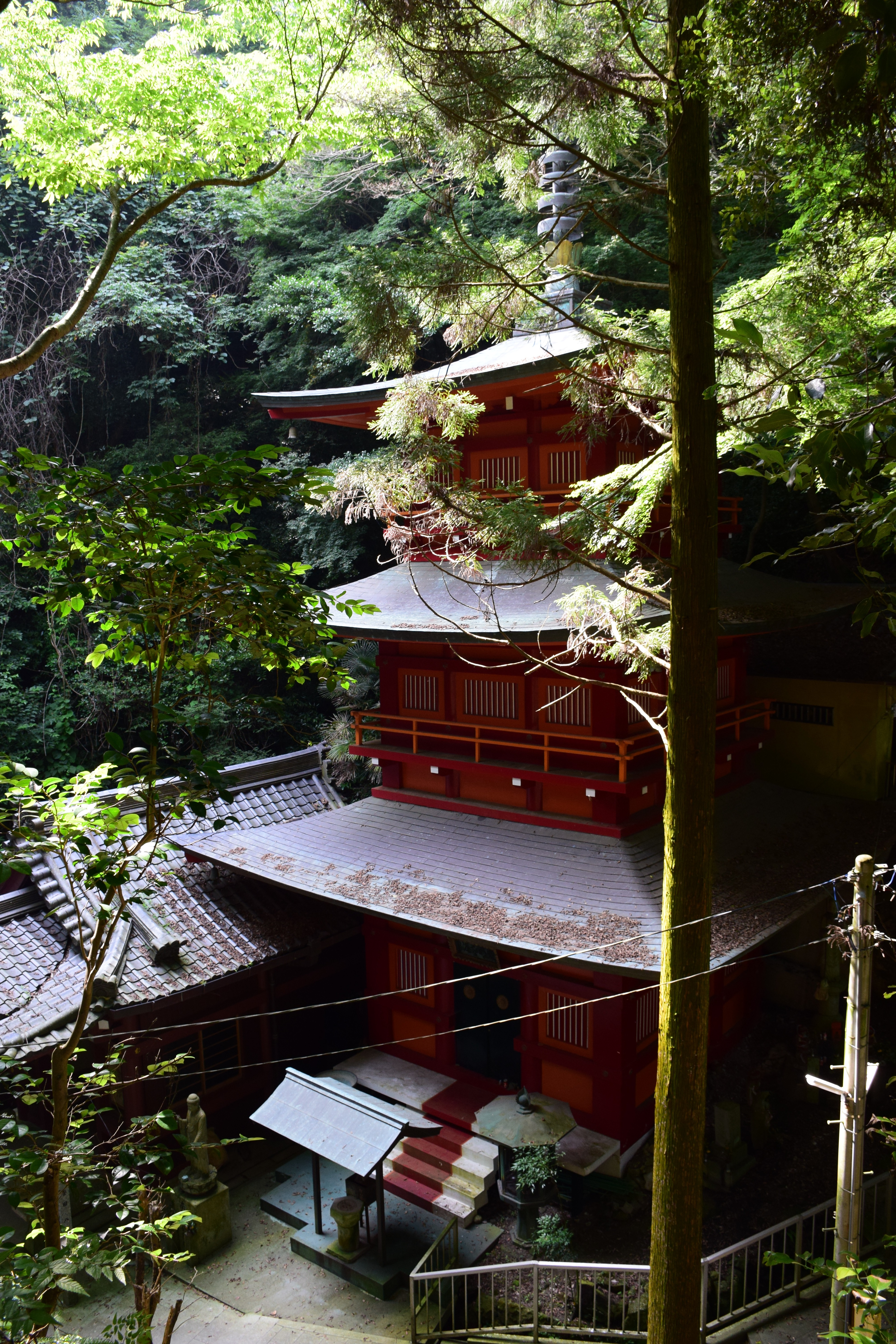 岩屋寺奥之院 Nikon D5300